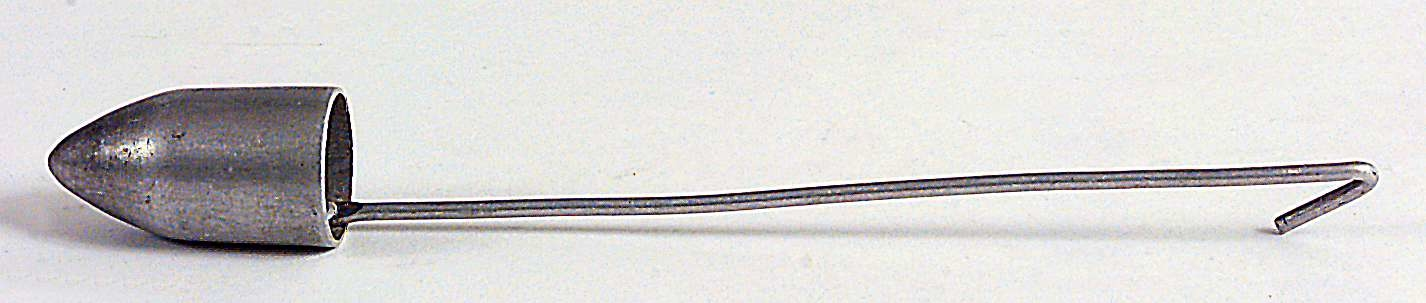 Føteskummer i aluminium. Lengde 21,2 cm. Foto Anne-Lise Reinsfelt / Norsk Folkemuseum, NF.1986-0497.